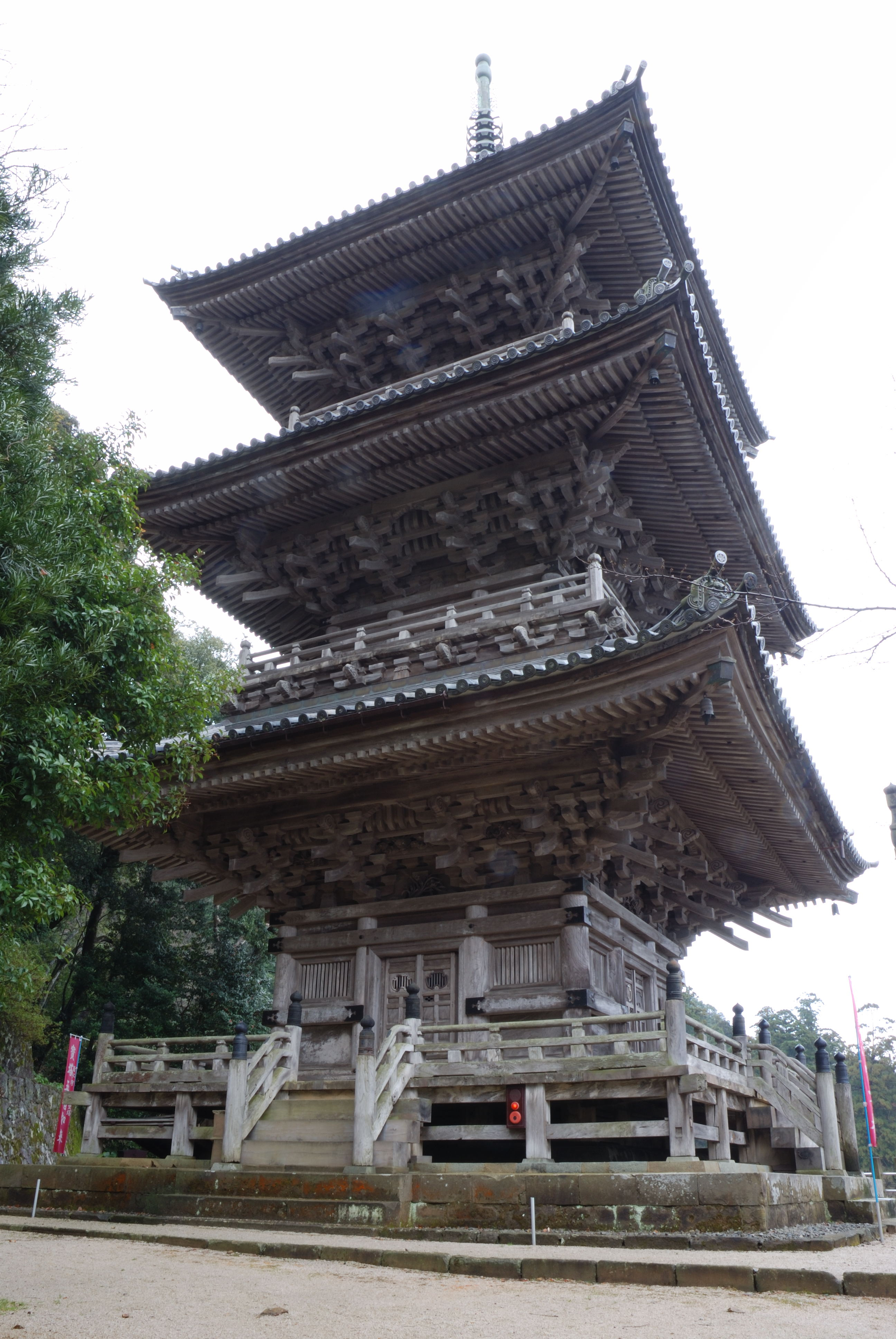 Kiyomizu-dera sanjuto